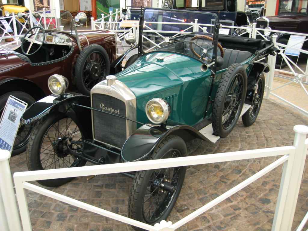 Peugeot Type 172 - Musée Peugeot Sochaux